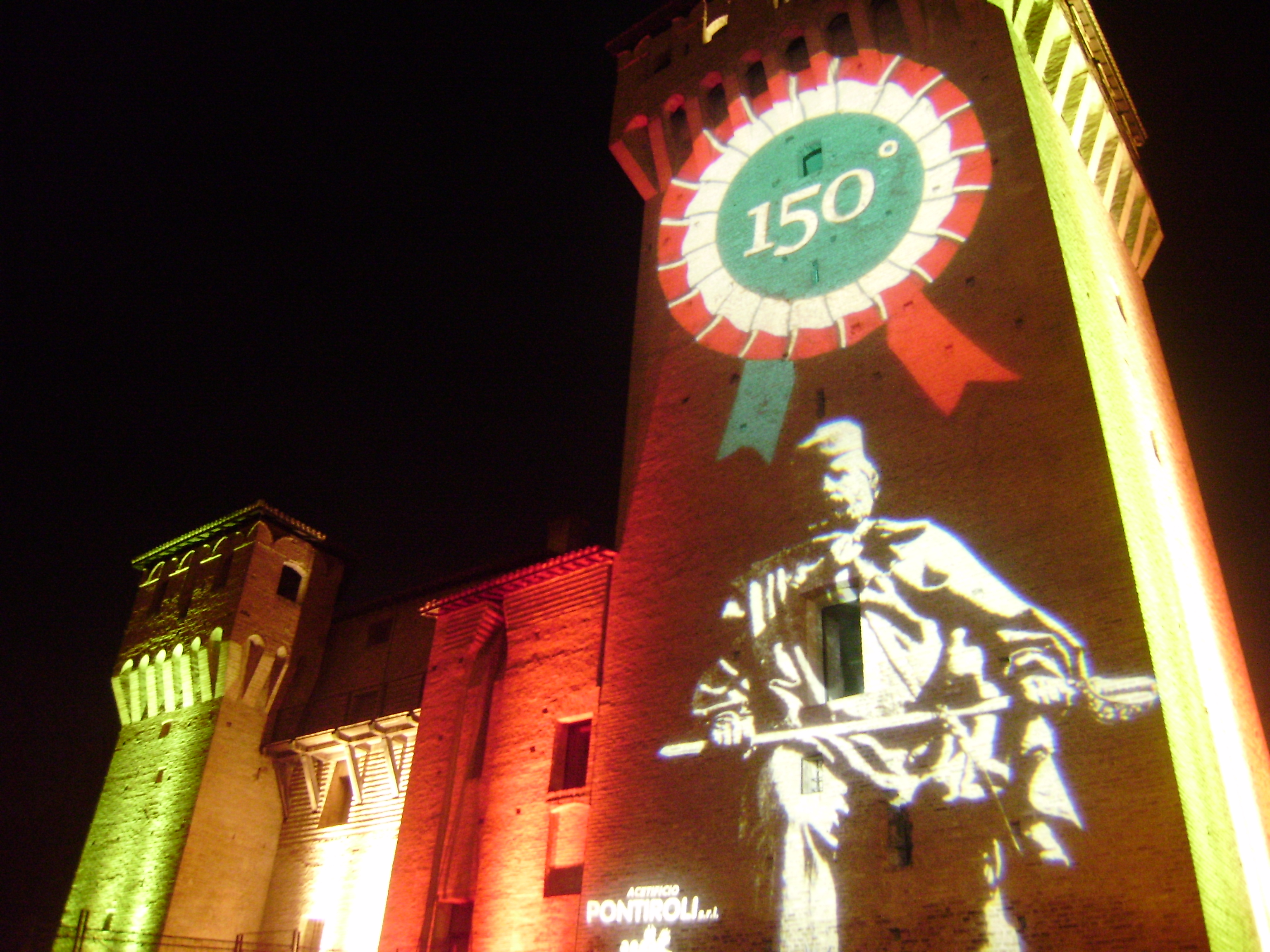 Rocca Estense addobbata con fasci luminosi in occasione del 150° anniversario dell'unità d'Italia (2011) This is a photo of a monument which is part of cultural heritage of Italy.